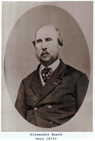 Александър Екзарх, български възрожденски книжовник, дипломат и журналист, член на Българското книжовно дружество (1884)